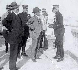 Le président de la Chambre des députés Paul Deschanel lors d'une visite au Maroc.